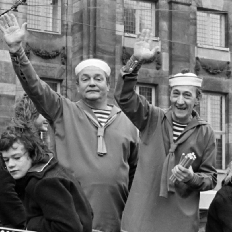 Kinderpostzegelactie op Dam in Amsterdam van start gegaan Peppi en Kokki (de Camees) in sloep op de Dam 12 november 1974